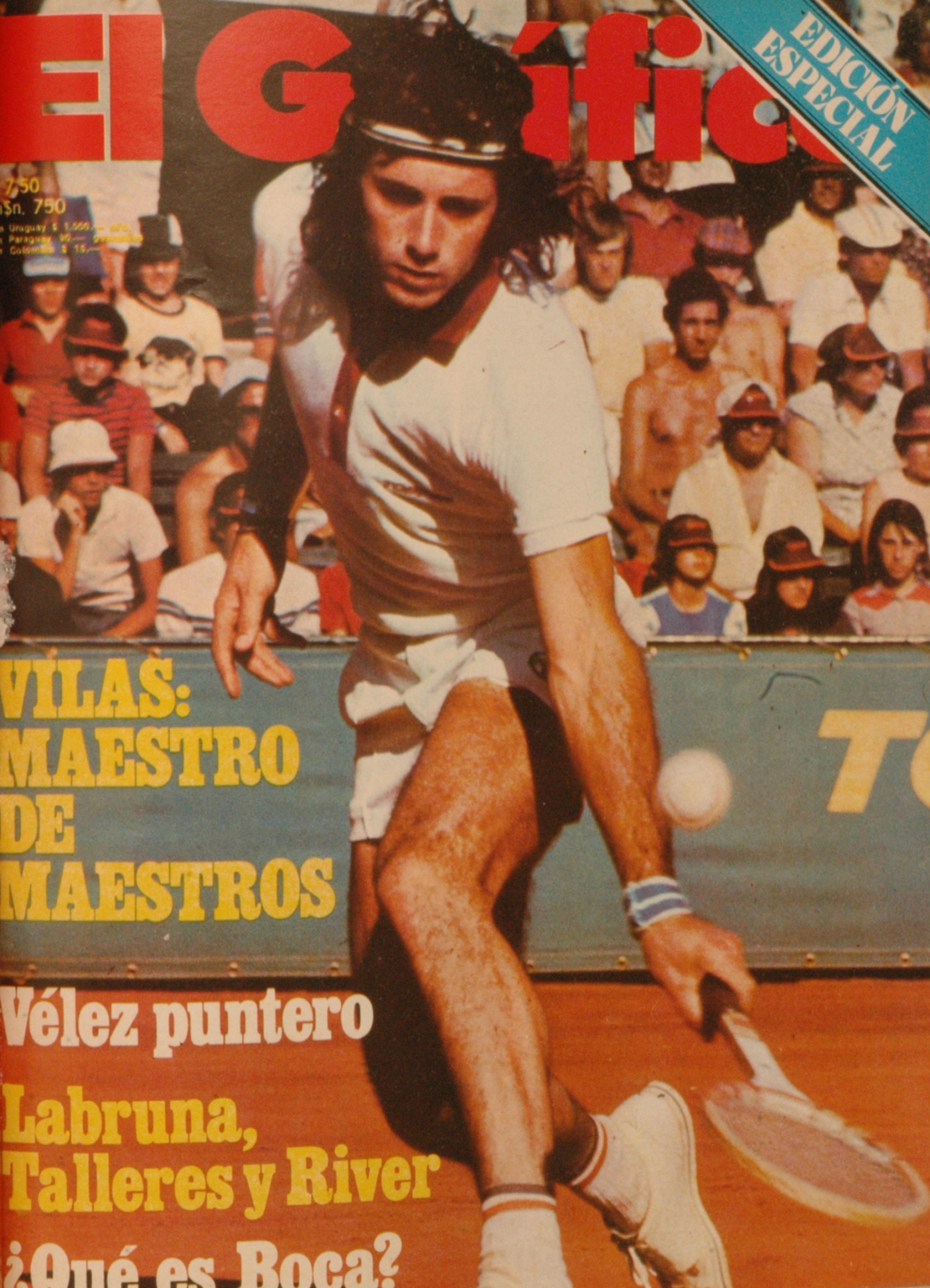 El Grafico del 18 de Diciembre de 1974. Edicion 2880